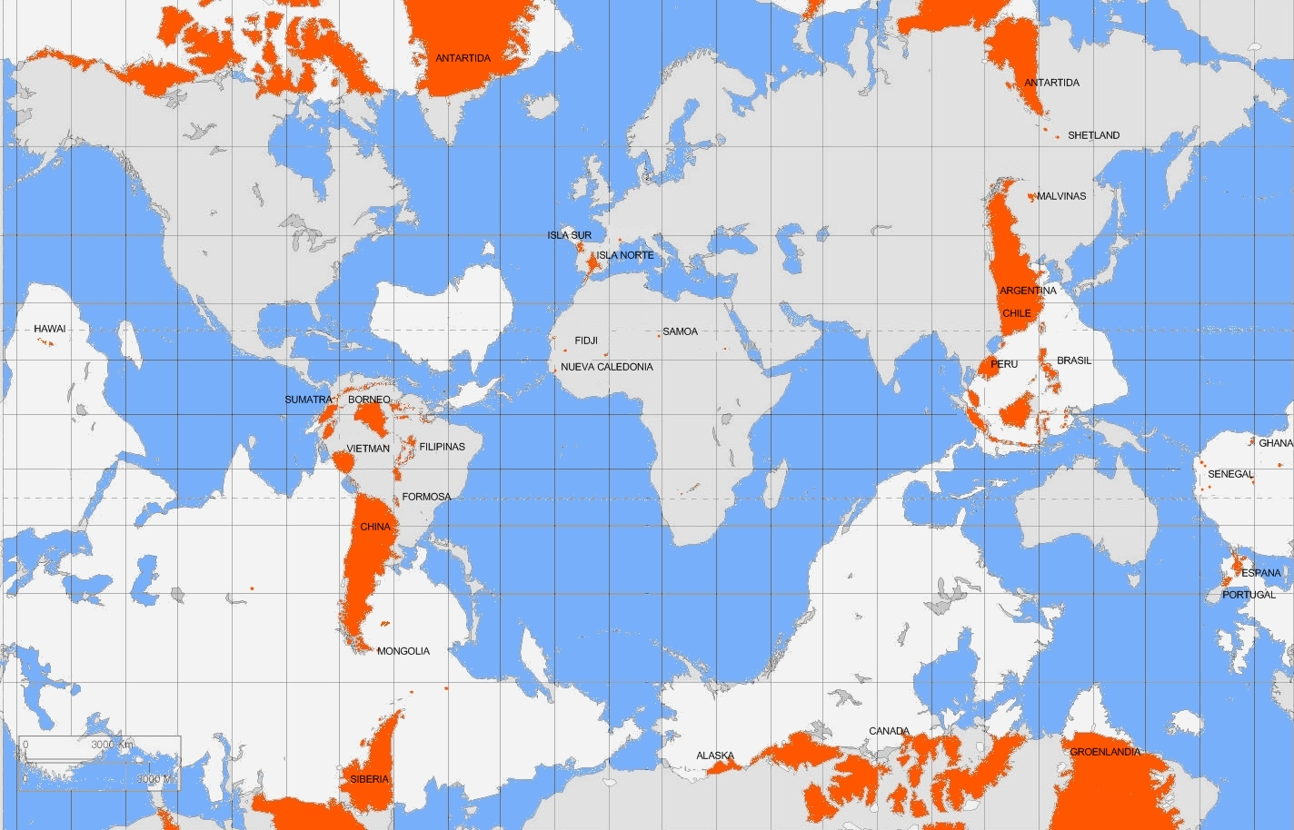 mapa con las antipodas terrestres, con el nombre de cada una de ellas